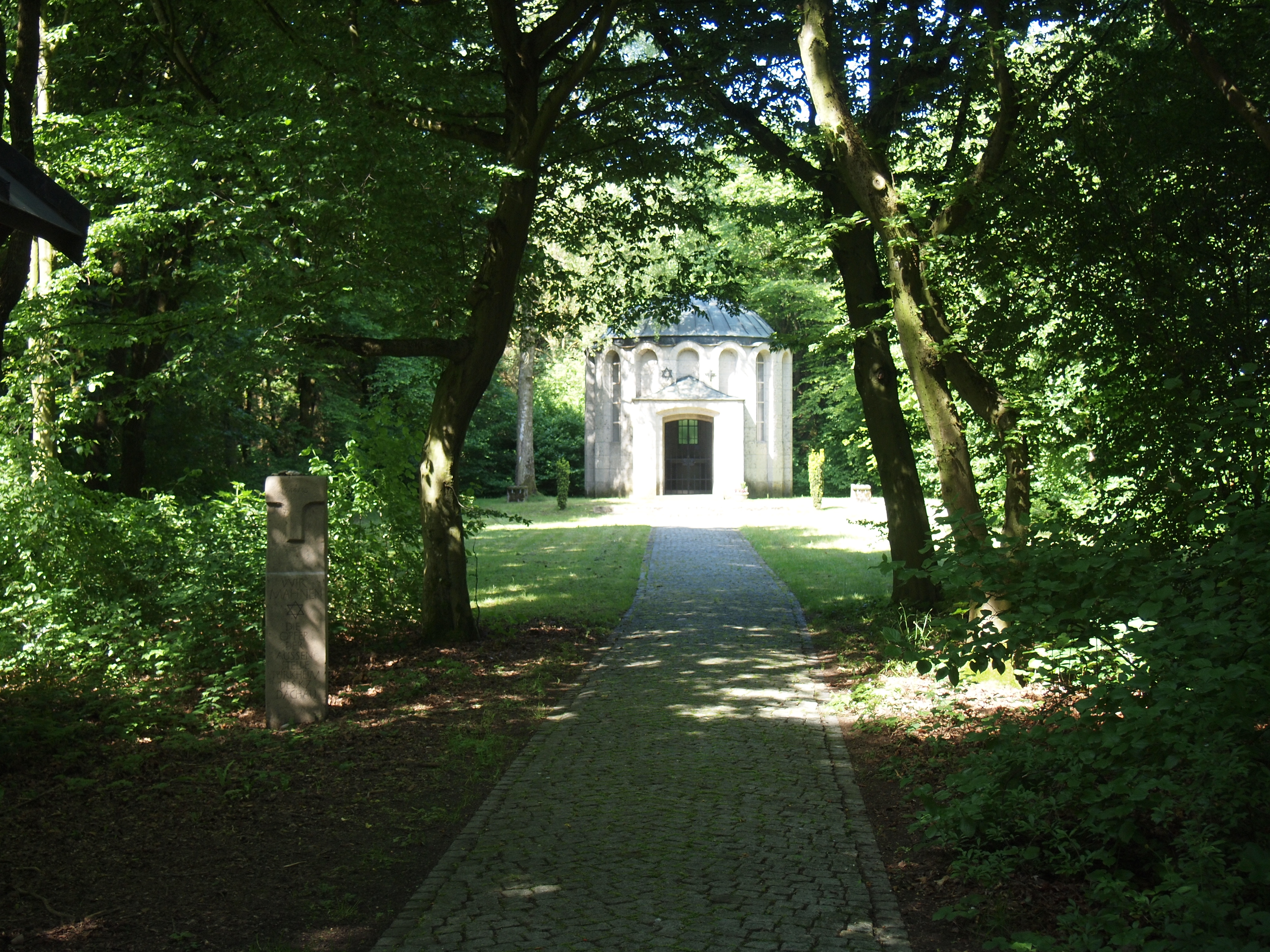 Eingang zum Friedhof des Konzentrationslager Kaufering VI, Außenlager Türkheim }